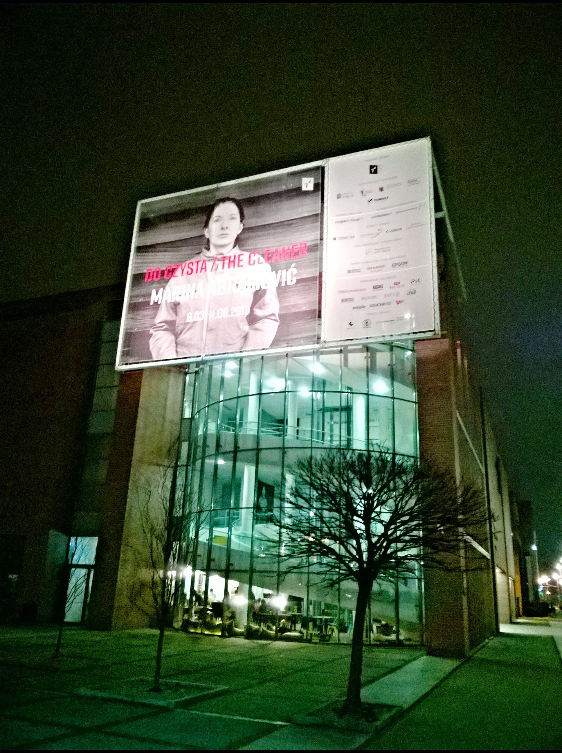 CSW Toruń, noc